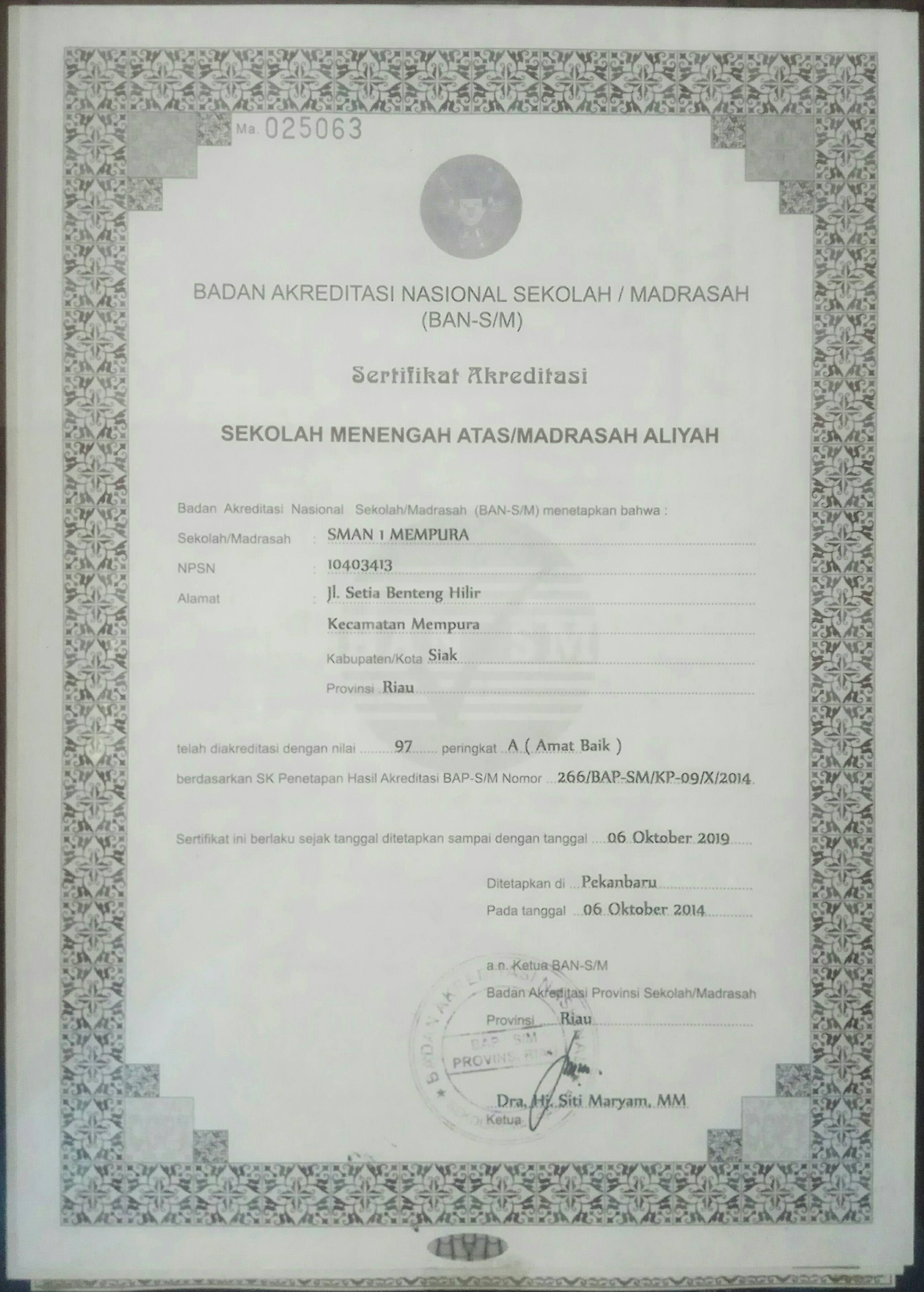 Surat keterangan nilai akreditasi SMA Negeri 1 Mempura. Ditetapkan tanggal 6 Oktober 2014